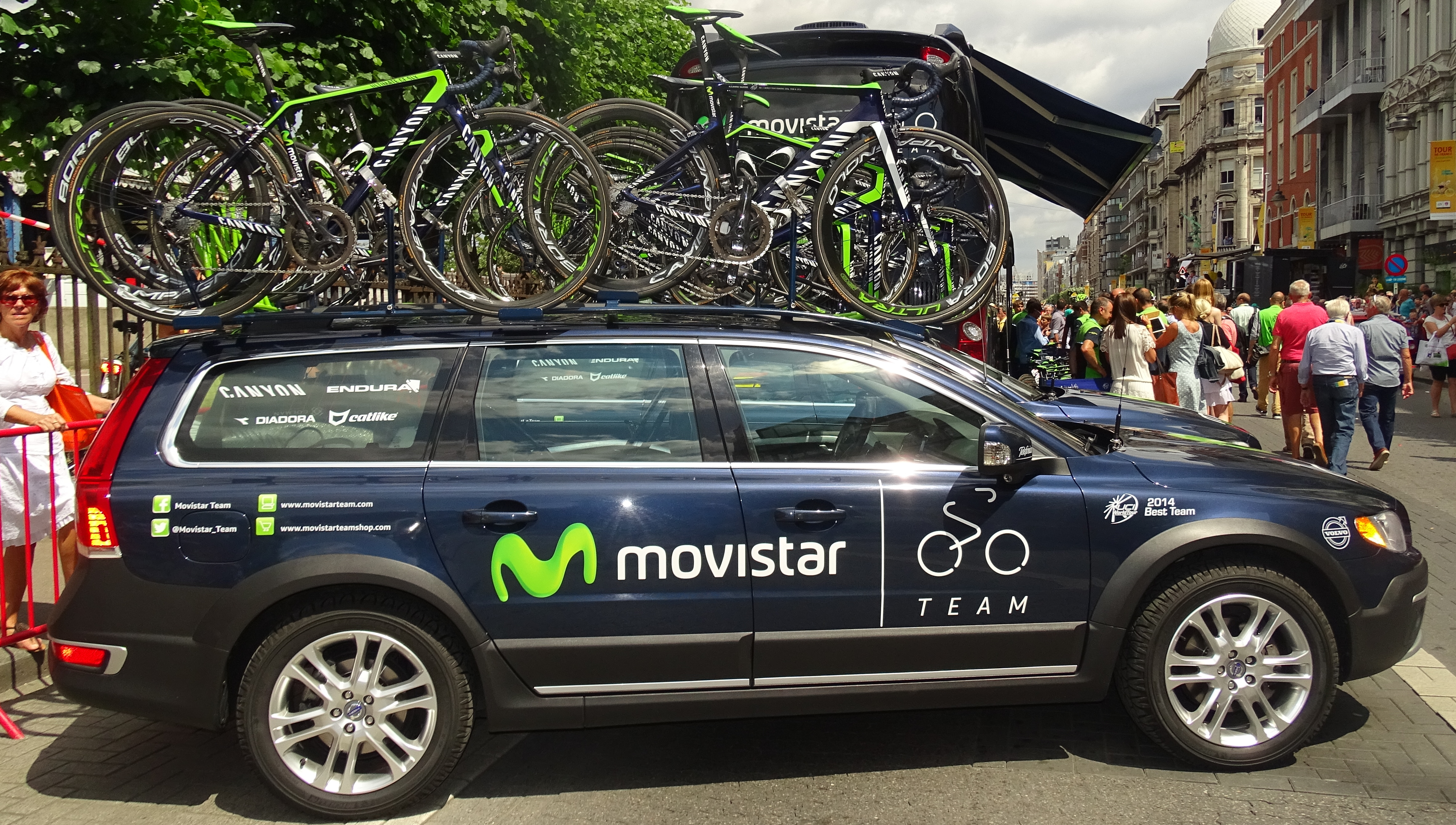 Reportage réalisé le lundi 6 juillet à l'occasion du départ de la troisième étape du Tour de France 2015 à Anvers, Belgique.